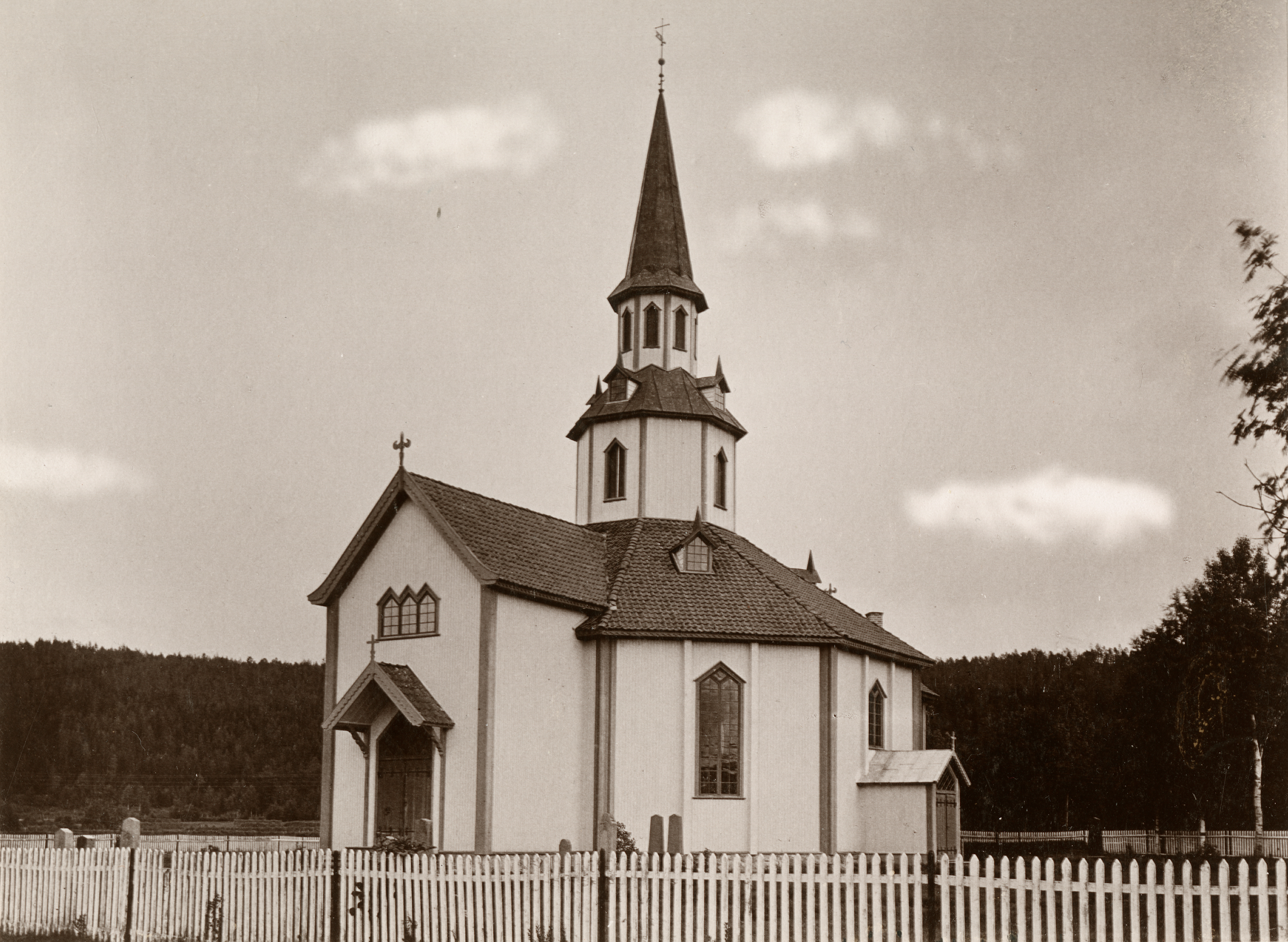 Mo kirke i Mo, Hedmark This image on crowdsourcing geotagging platform Fotodugnad